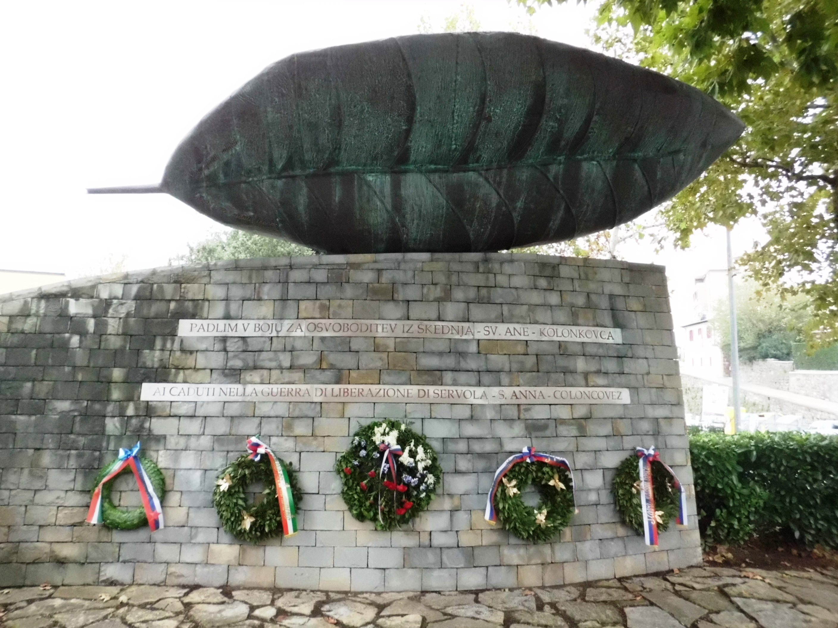 Monumento ai caduti nella guerra contro gli occupatori nazisti presso il cimitero Sant'Anna di Trieste